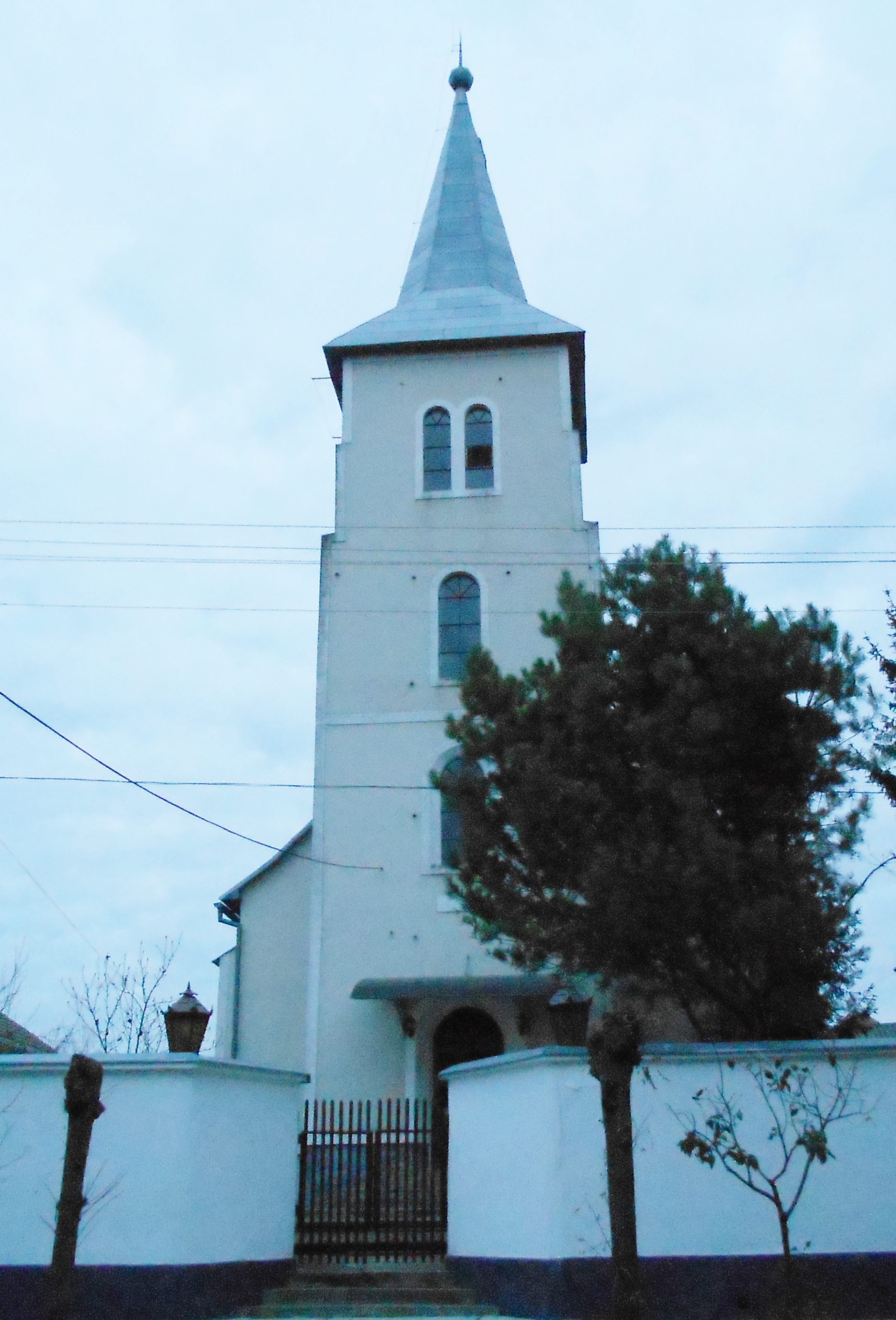 Реформатська церква в с. Горонглаб